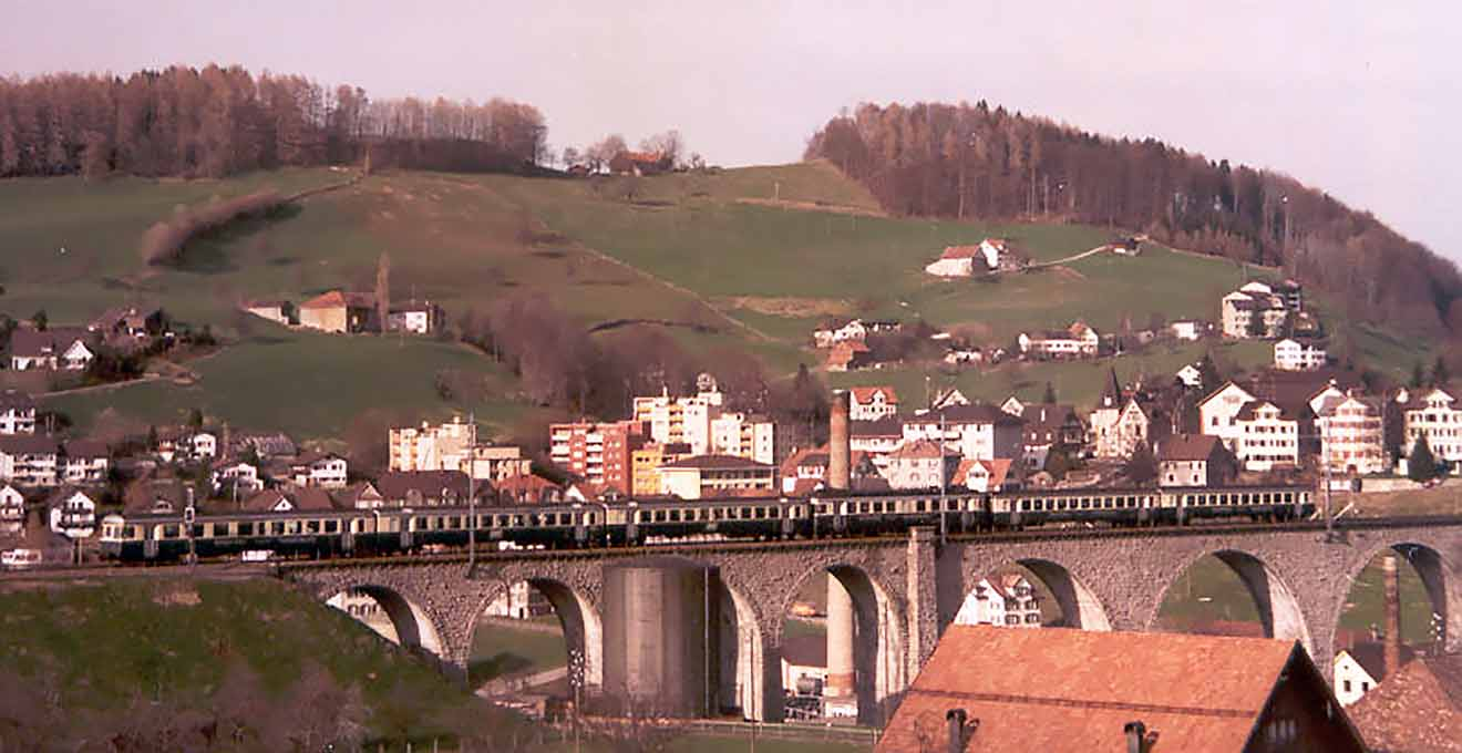 BT BDe 4/4 51-53 mit vierteiligem Pendelzug und zwei Verstärkungswagen als Zug 8670 auf dem so genannten Cylanderviadukt (Glattal-Viadukt) bei Herisau